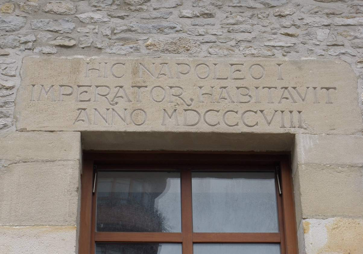 Echezarra (casa que alojó al emperador Napoleón Bonaparte en 1808 durante su campaña en España), en Vitoria-Gasteiz